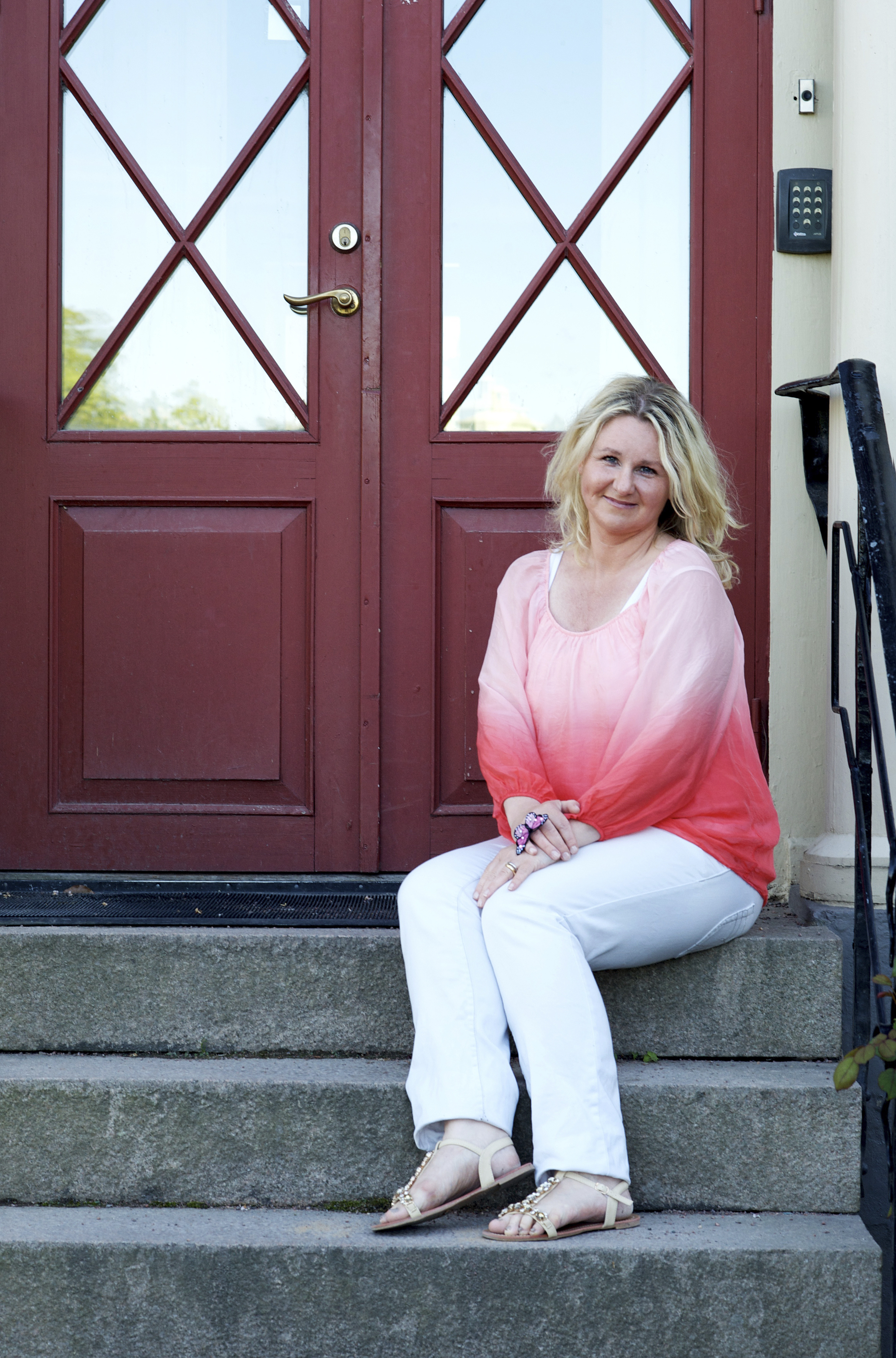 Tidningen Må bra fotograf Anne-Charlotte Fägerlind.